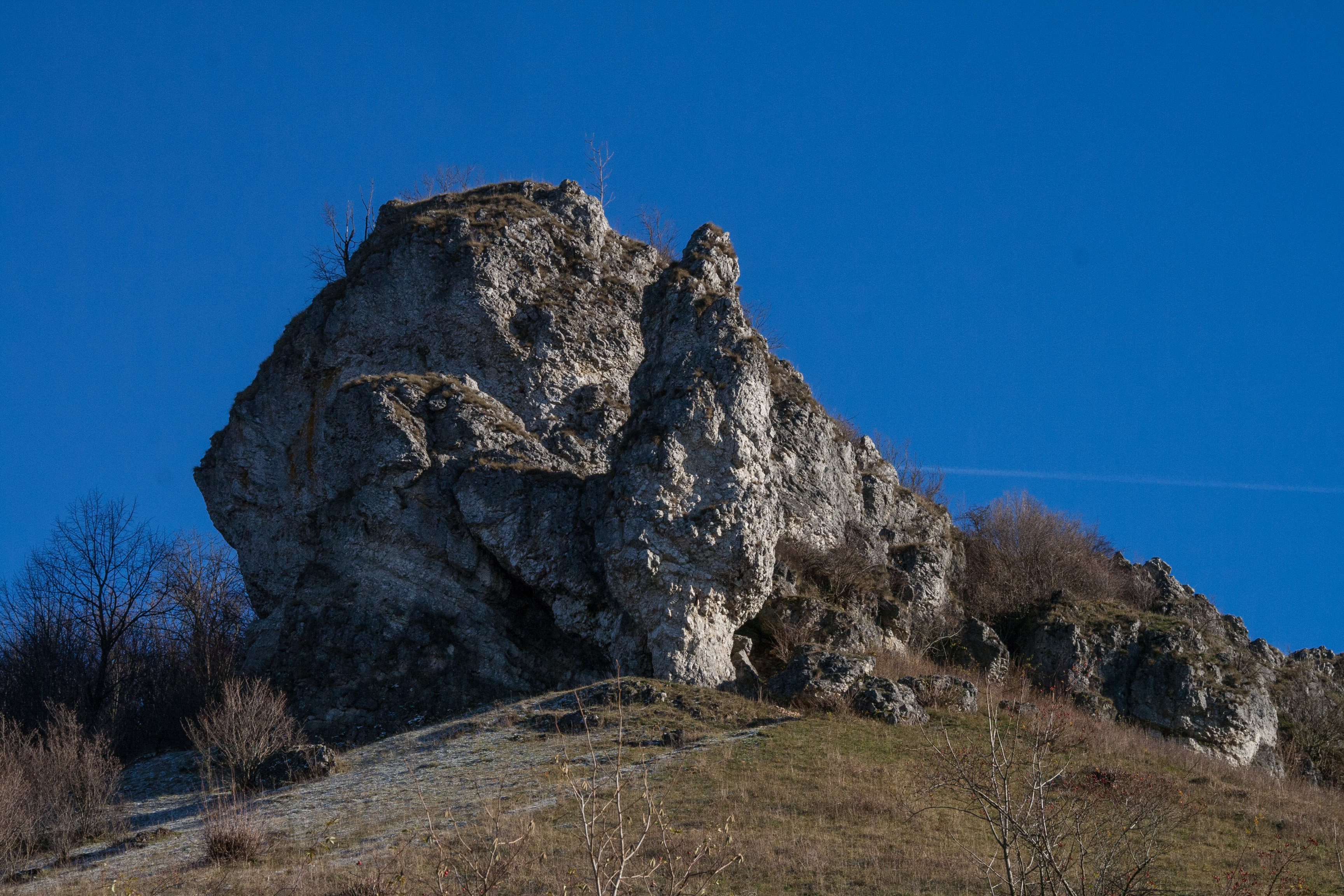 Ehrenbürg, Walberla, Steinerne Frau